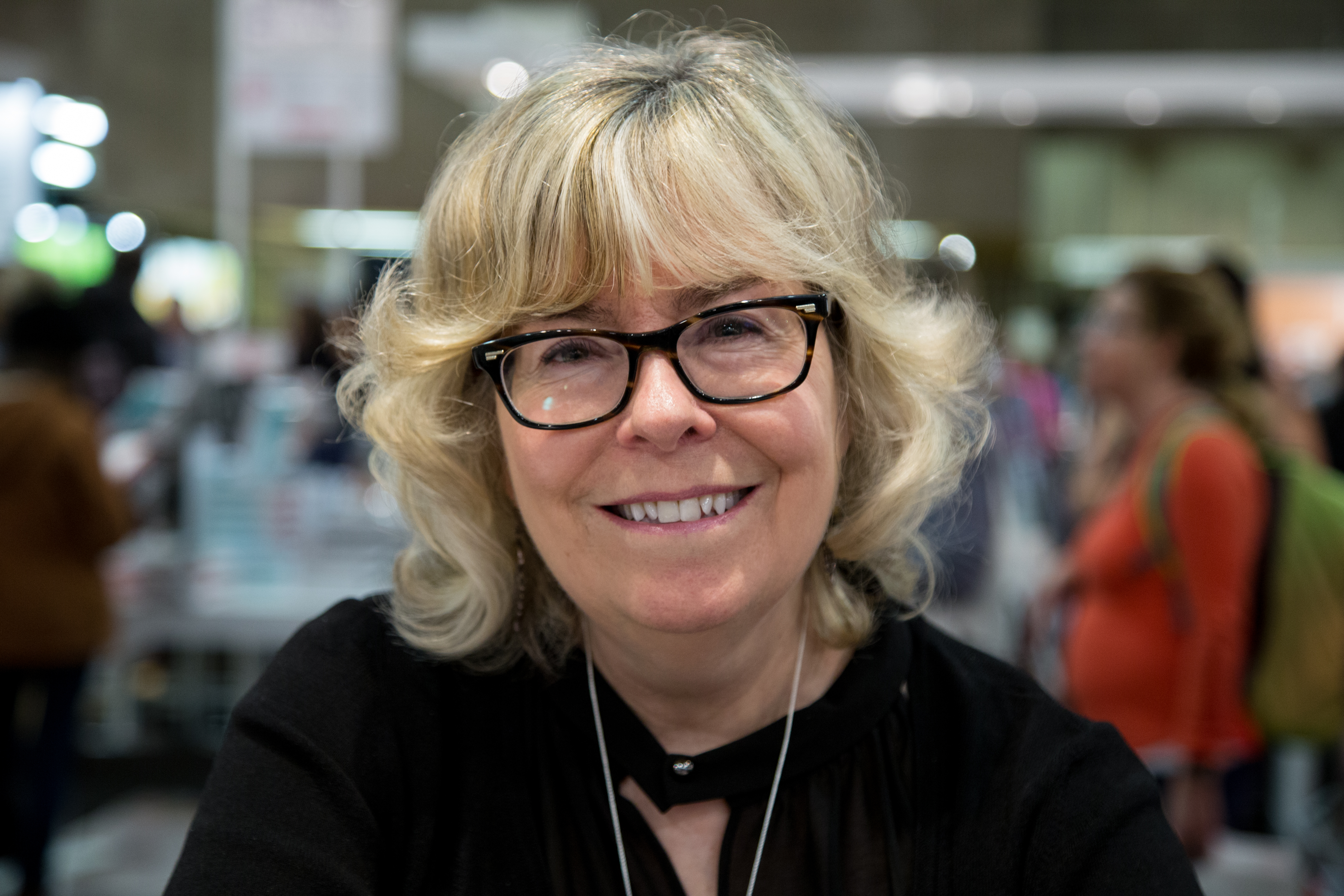 Suzanne Aubry lors du Salon du livre de Montréal 2017 à la Place Bonaventure.